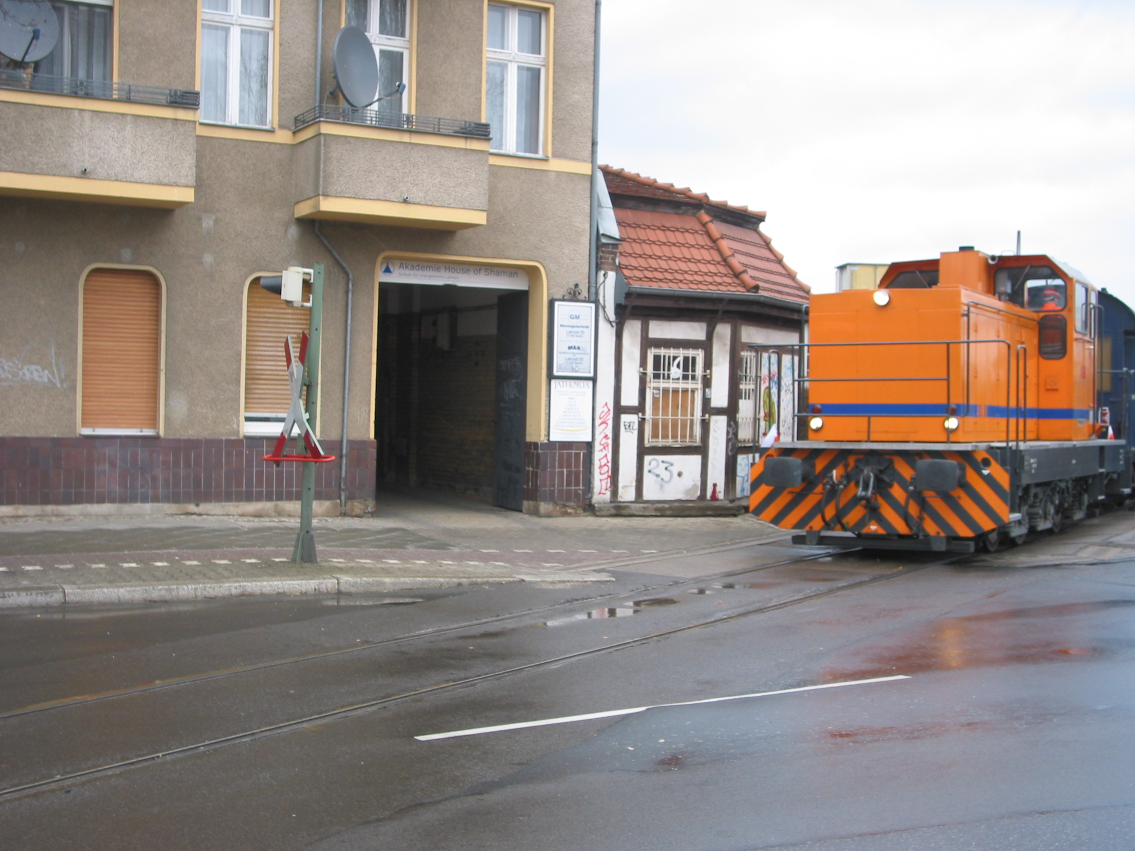 Berlin-Neukoelln: DL 06 der Industriebahn Gesellschaft Berlin GmbH am Schluss eines Zuges des Vereins Traditionszug Berlin e.V. beim Überqueren des Bahnübergangs Lahnstrasse